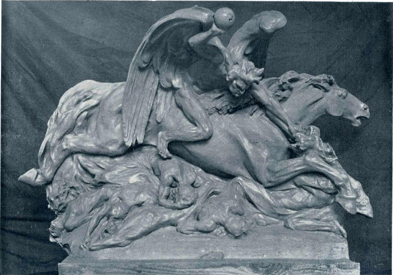 Potop.